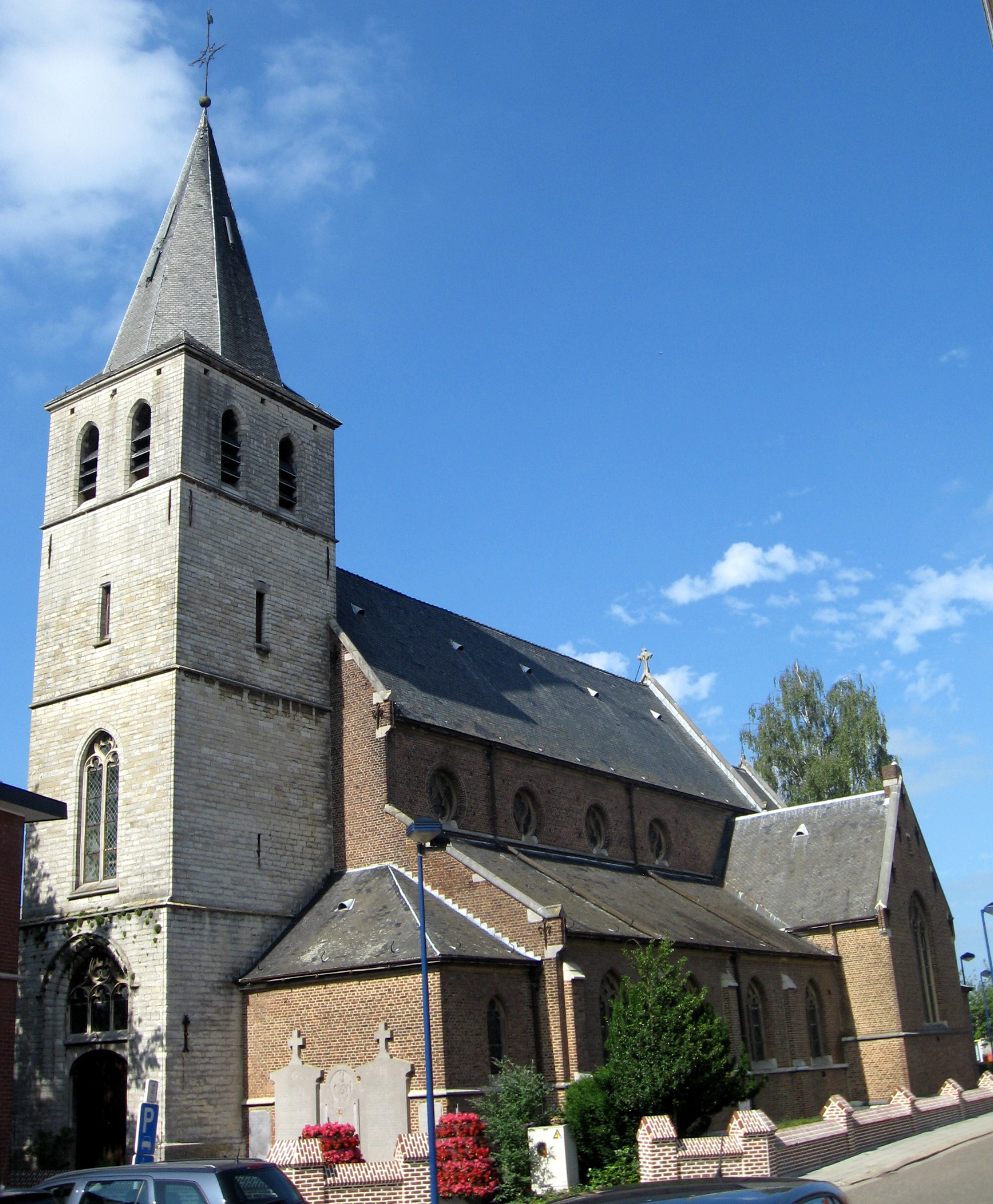 Sint-Mauruskerk in Holsbeek